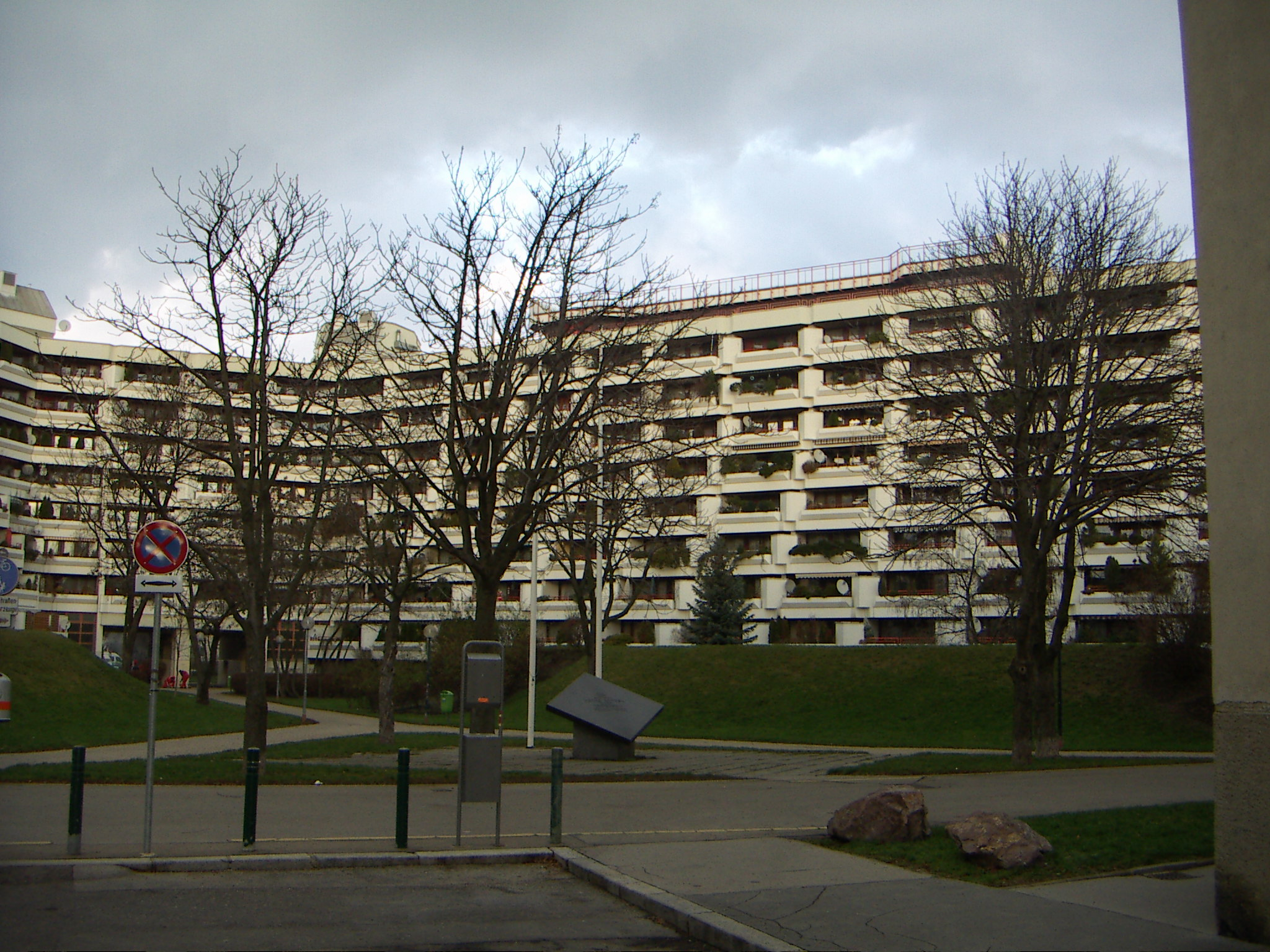 Wohnhausanlage Heinz-Nittel-Hof, Gemeindebau, Floridsdorf, Architekt Harry Glück